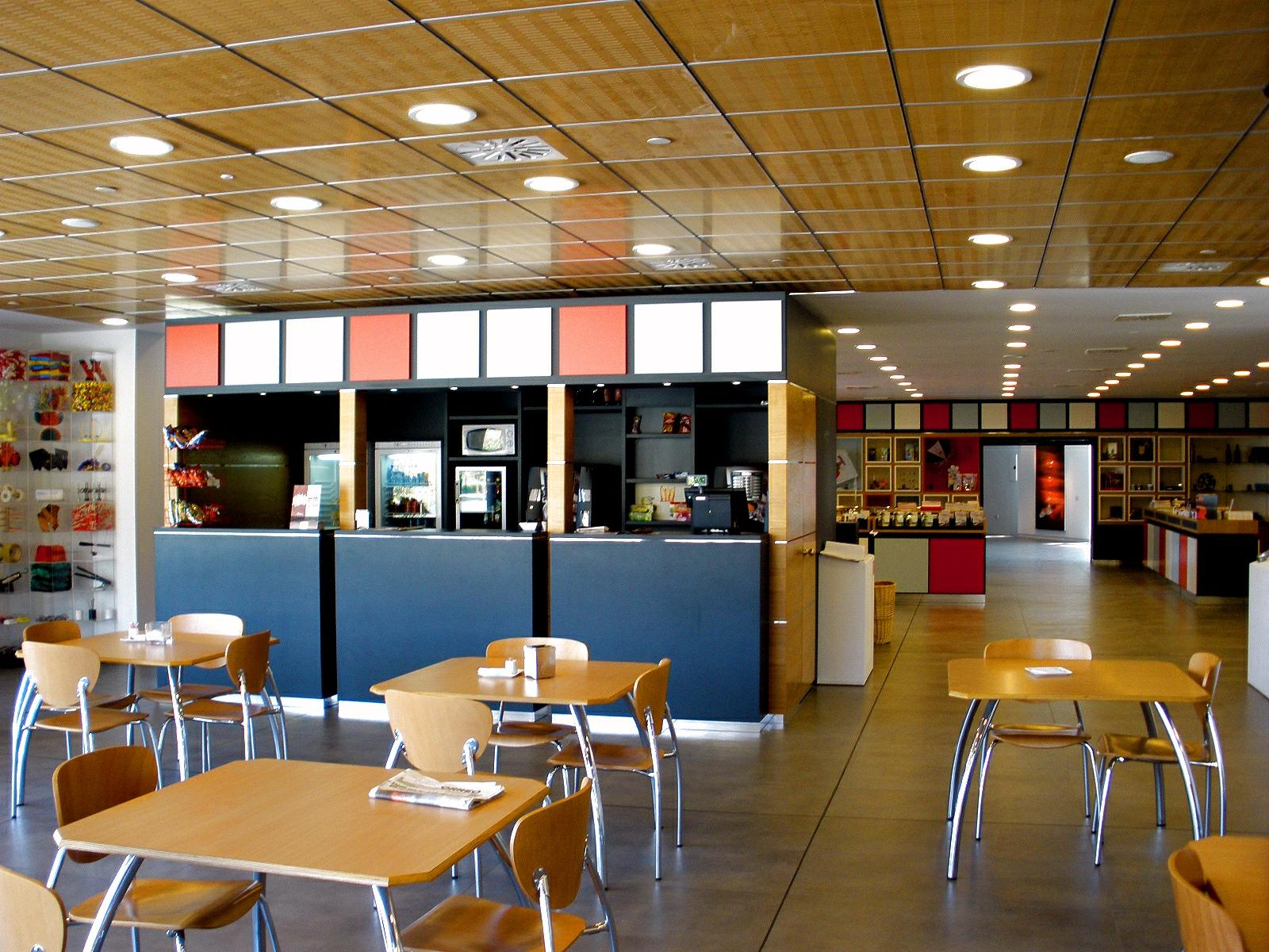 Cafetería del Museo Würth La Rioja, en Agoncillo (La Rioja, España)